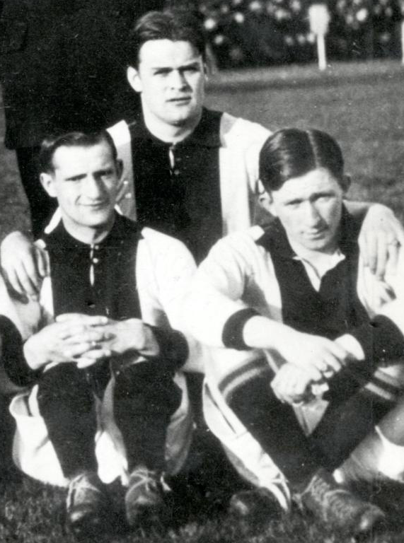 Rinus Lucas, Frits Terwee, Wim Gupffert